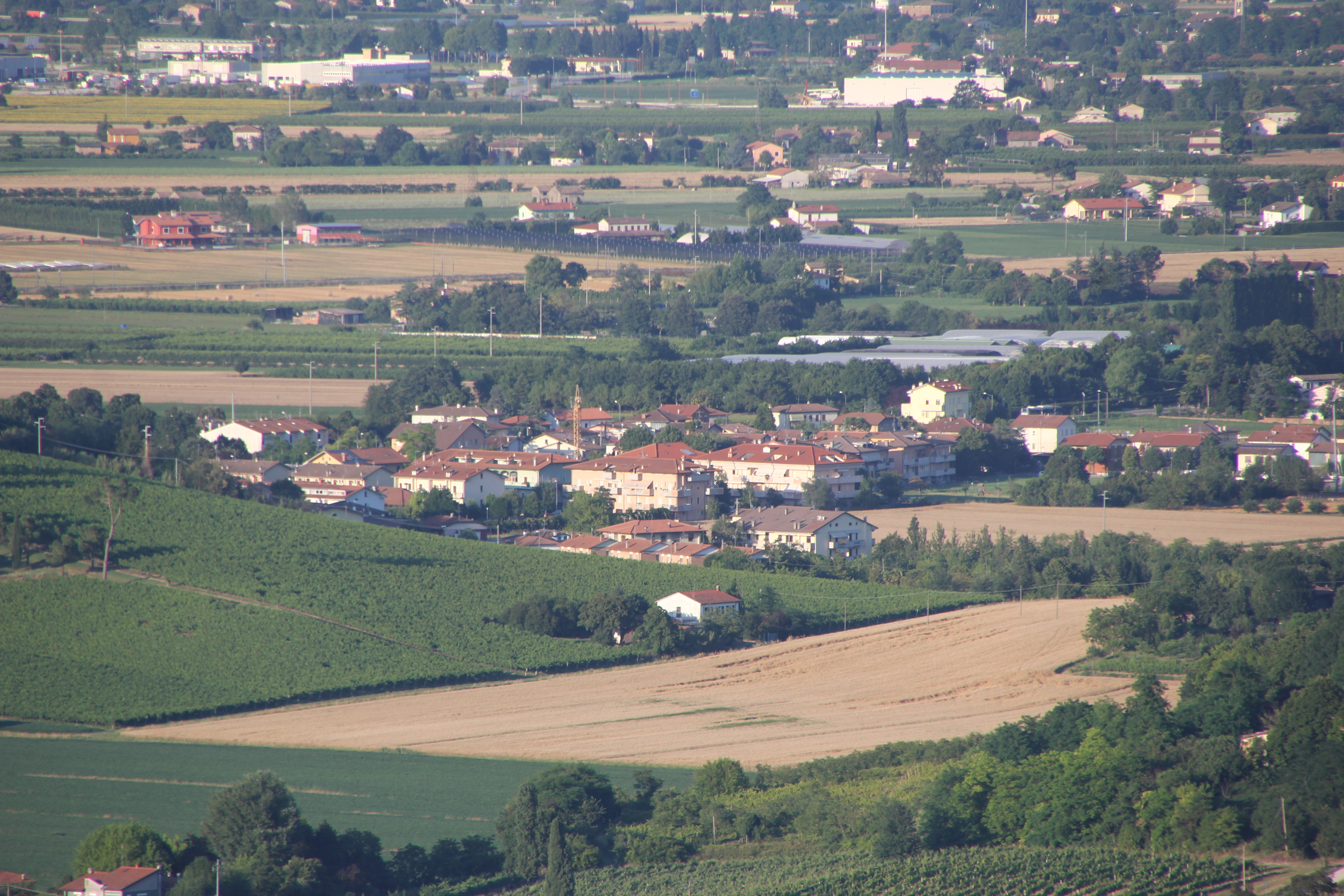 Bertinoro, frazione Capocolle, panorama